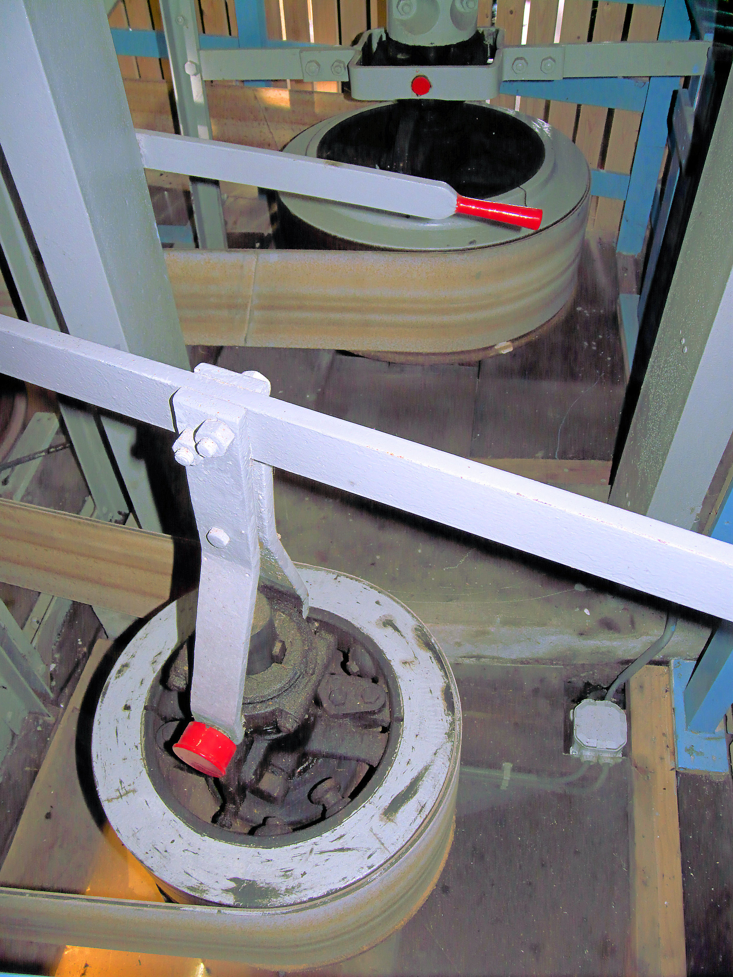 Poldermolen Waardenburg, koppeling schroefpomp voor in en uit het werk zetten met hendel te bedienen